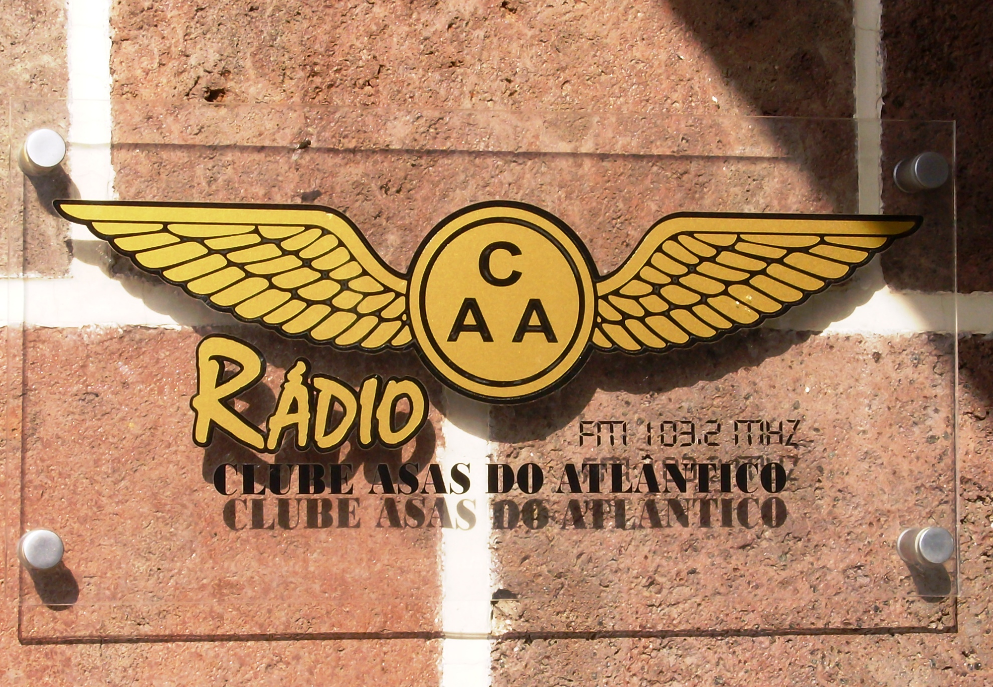 Placa exterior da Rádio Clube Asas do Atlântico, Vila do Porto, Ilha de Santa Maria, Açores.